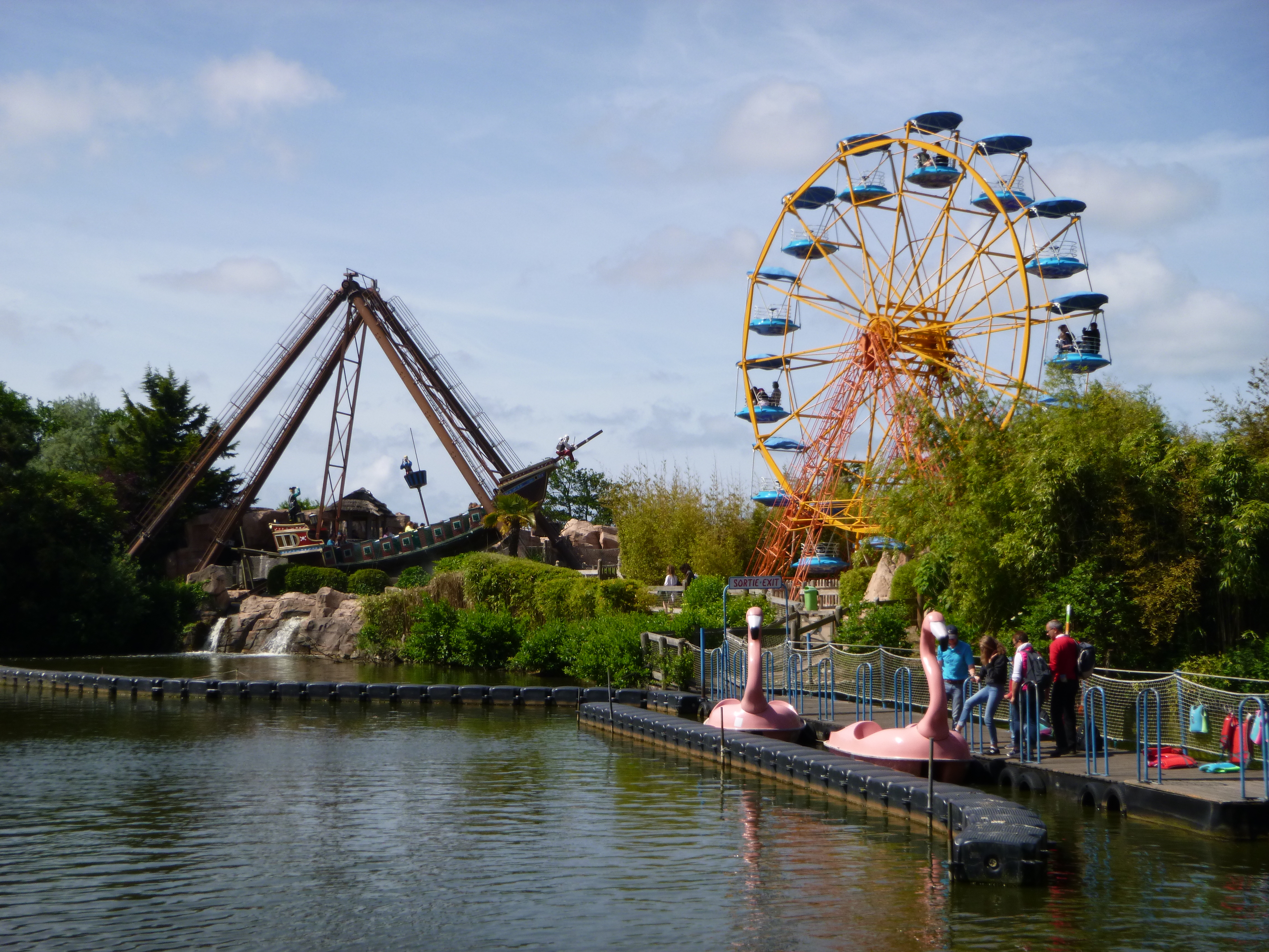 Bag Pearl Grande roue Flamingos Bagatelle